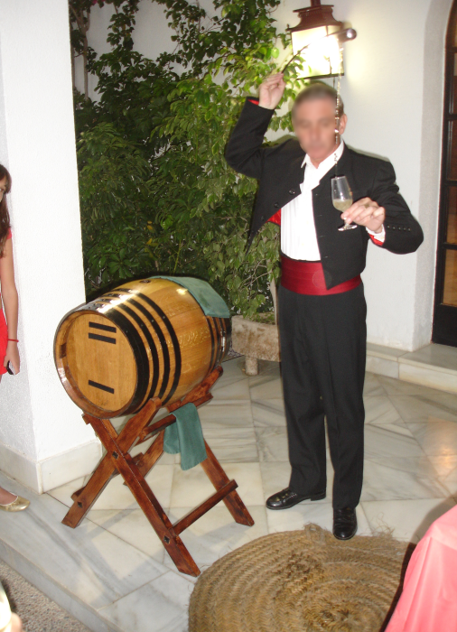 Venenciador sirviendo Sherry en Jerez de la Frontera